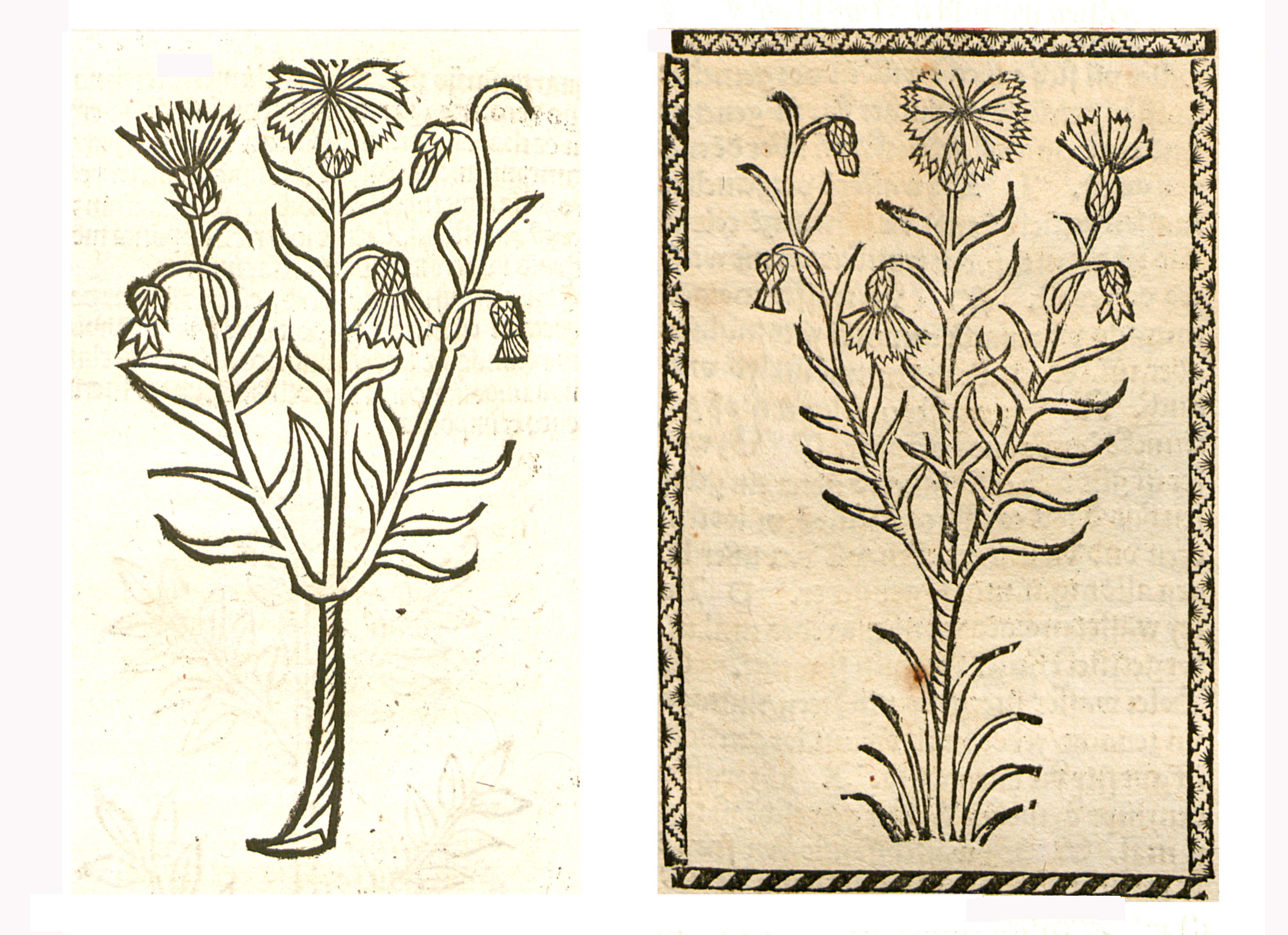 Abbildung von Blow Kornblum (Centaurea cyanus)